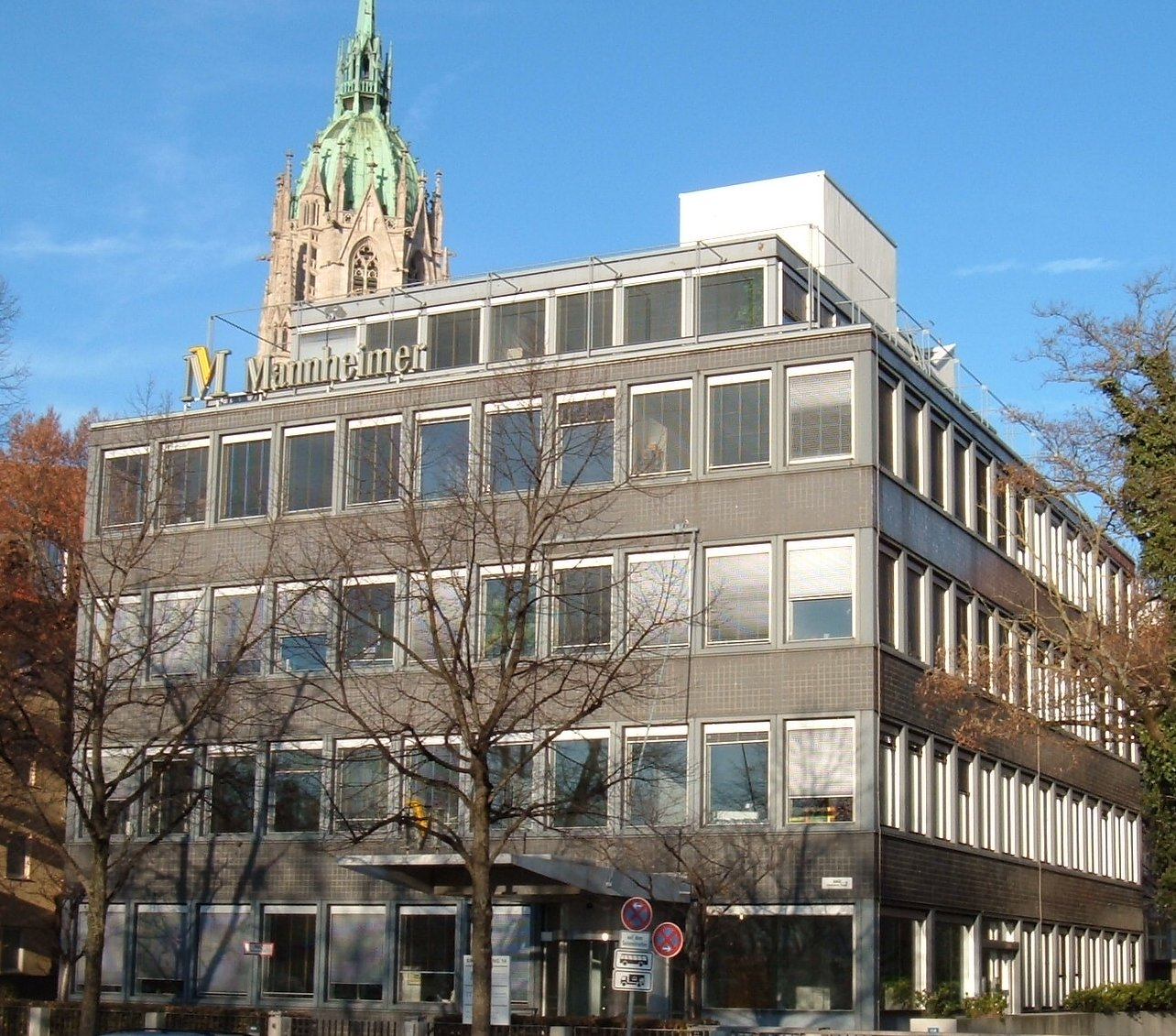 Verwaltungsgebäude der Mannheimer Lebensversicherung, Bavariaring 14, München